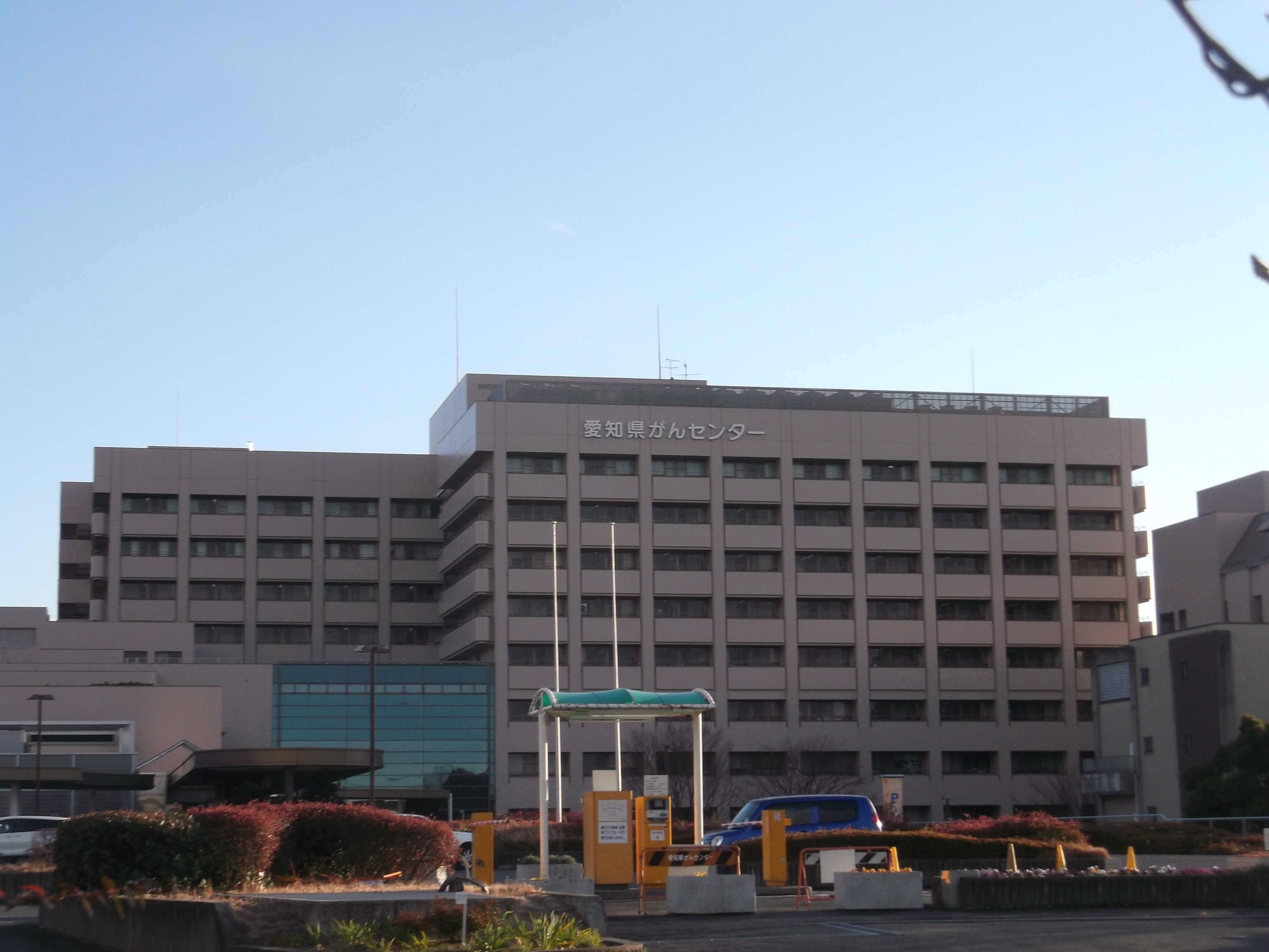 愛知県がんセンター中央病院